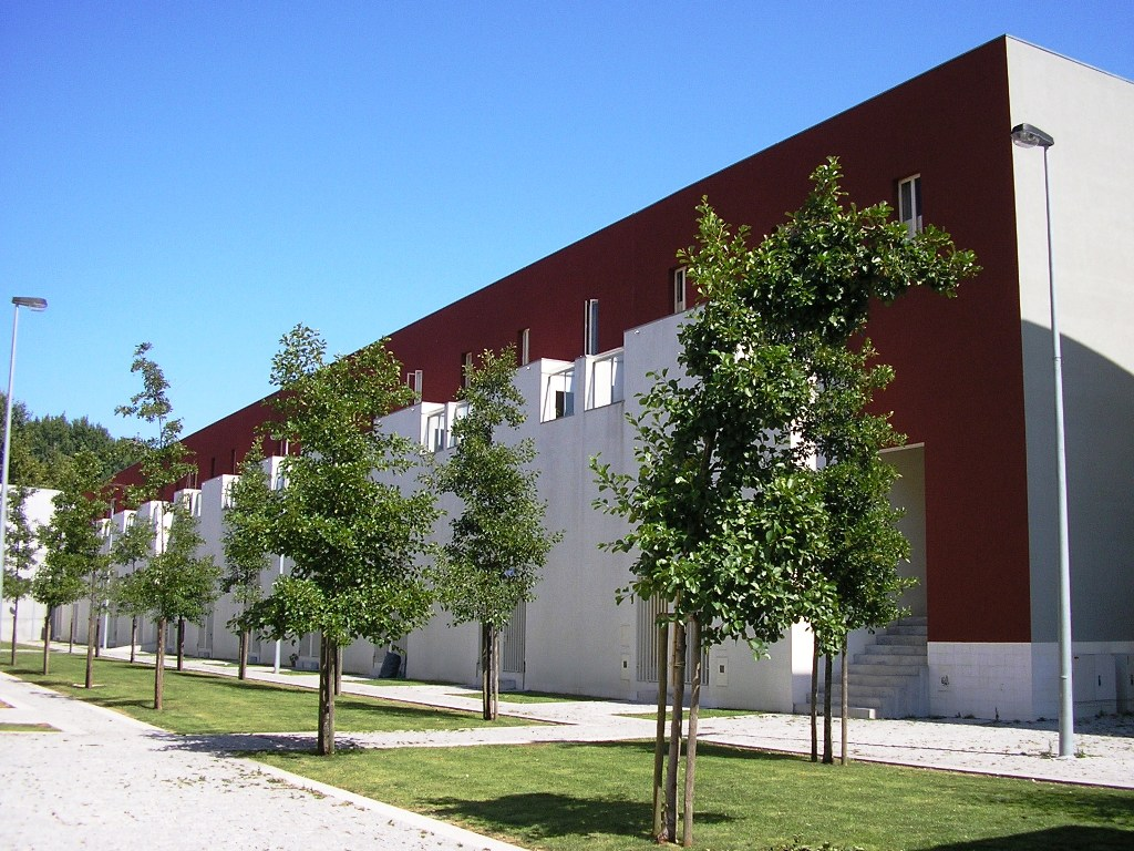 Bairro da Bouça from Alvaro Siza Vieira, Porto, Portugal